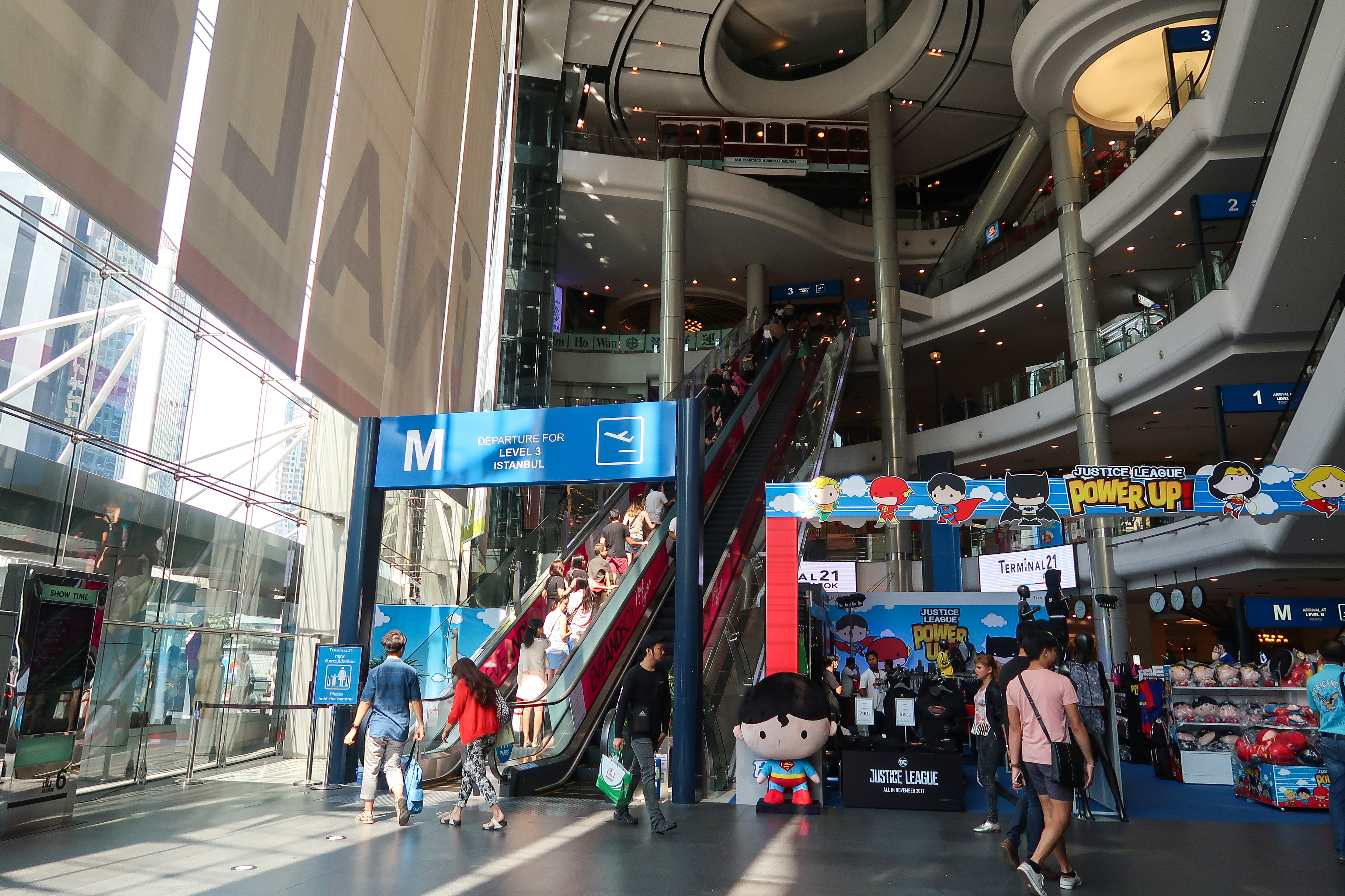 Terminal 21 Atrium